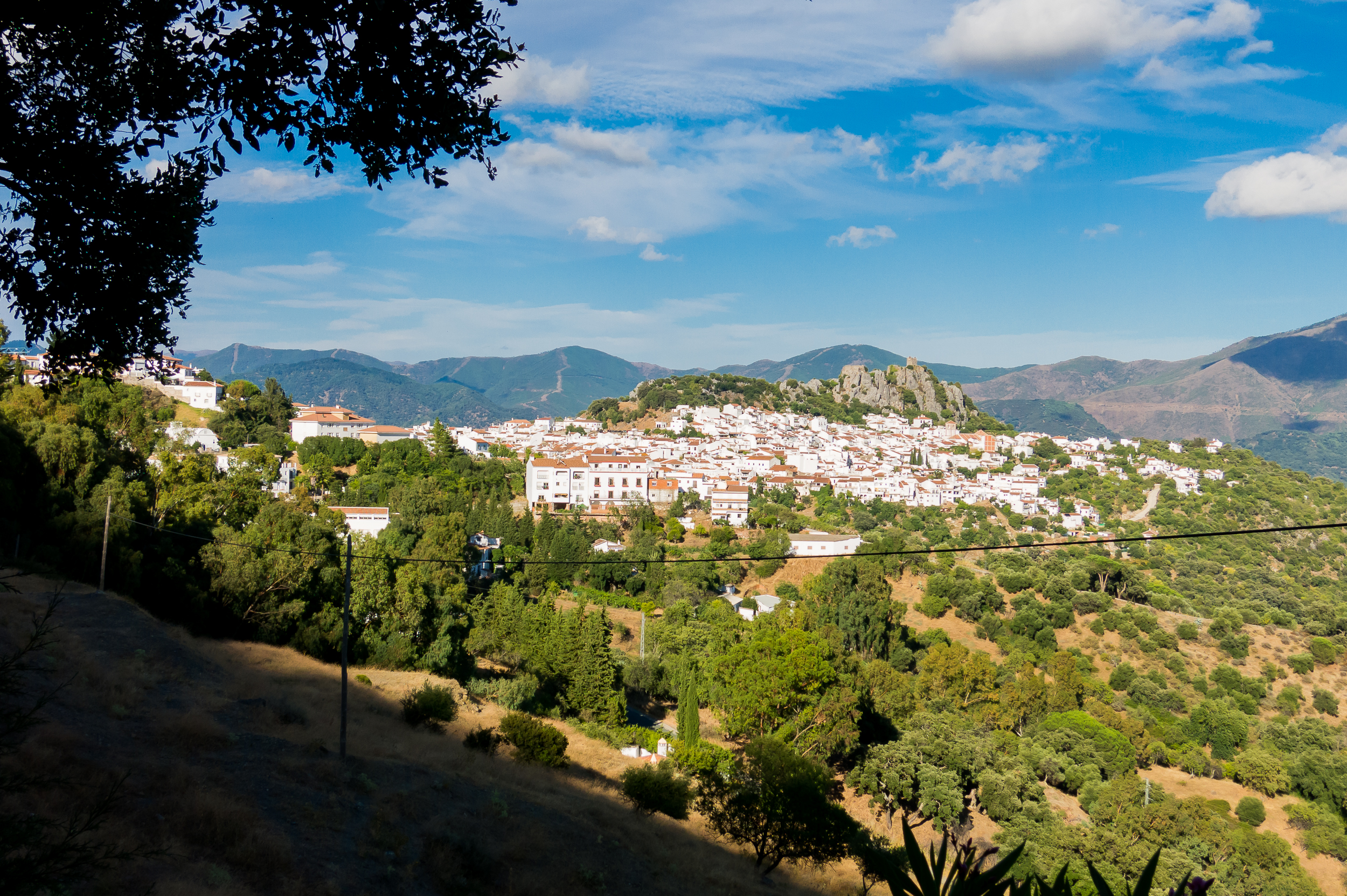 Gaucín desde el mirador sur en la A-405, en el Parque Miguel Serrato